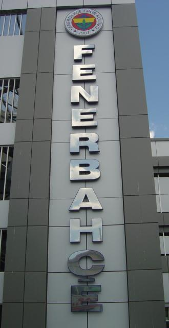 text on Sukru Saracoglu Stadium